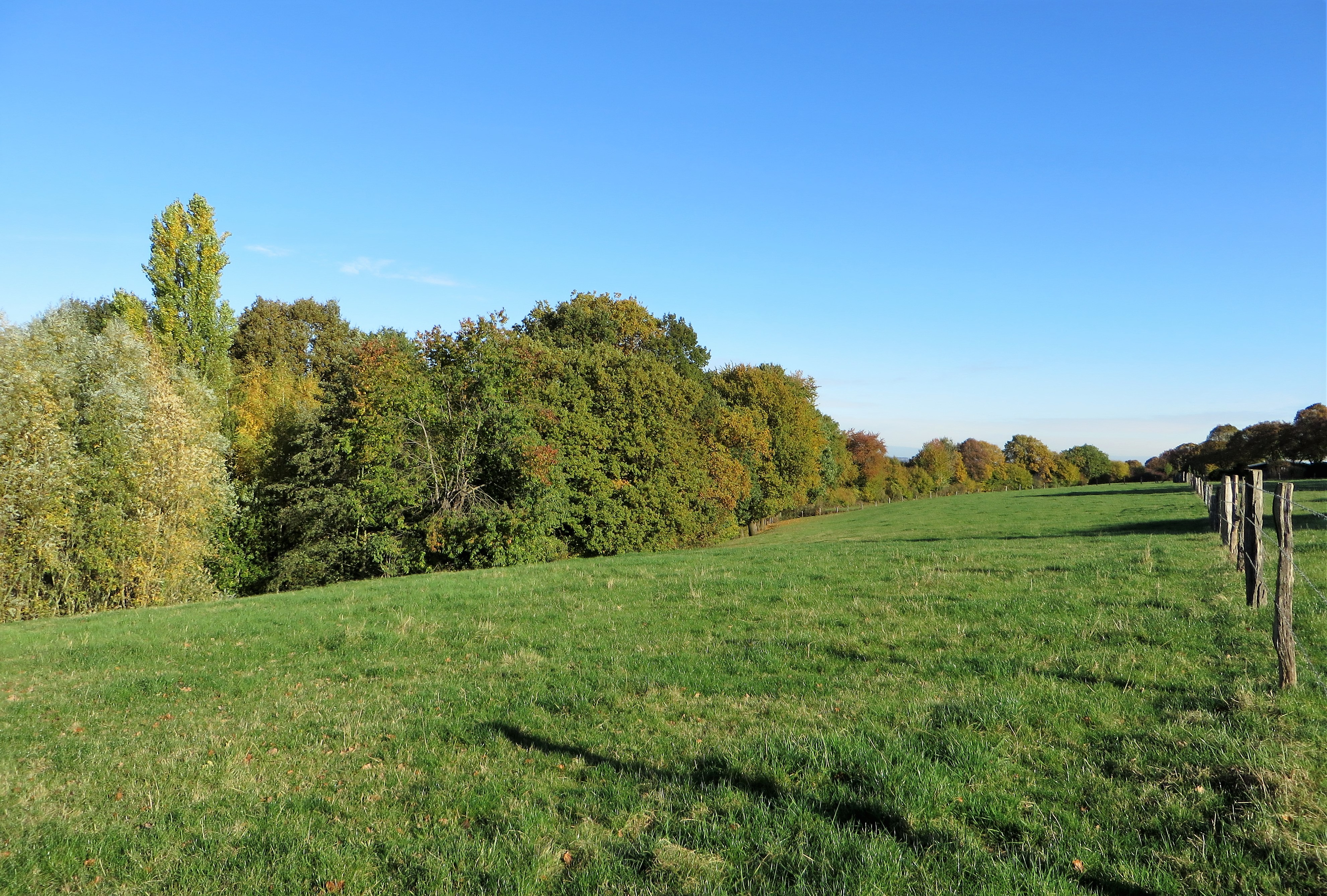 Geschützter Landschaftsbestandteil „Gehölzstreifen Garenfeld“ in Hagen-Garenfeld. Der geschützte Bereich verläuft zwischen dem Ortskern Garenfeld und der Straße „Zur Feldlage“ (Allee rechts) entlang einer Geländestufe auf einer Länge von 400 m. Es handelt sich im nördlichen Teil um einen hohlwegartigen, artenreichen Gehölzstreifen, der Südteil wird von 20 Kopfweiden gebildet.